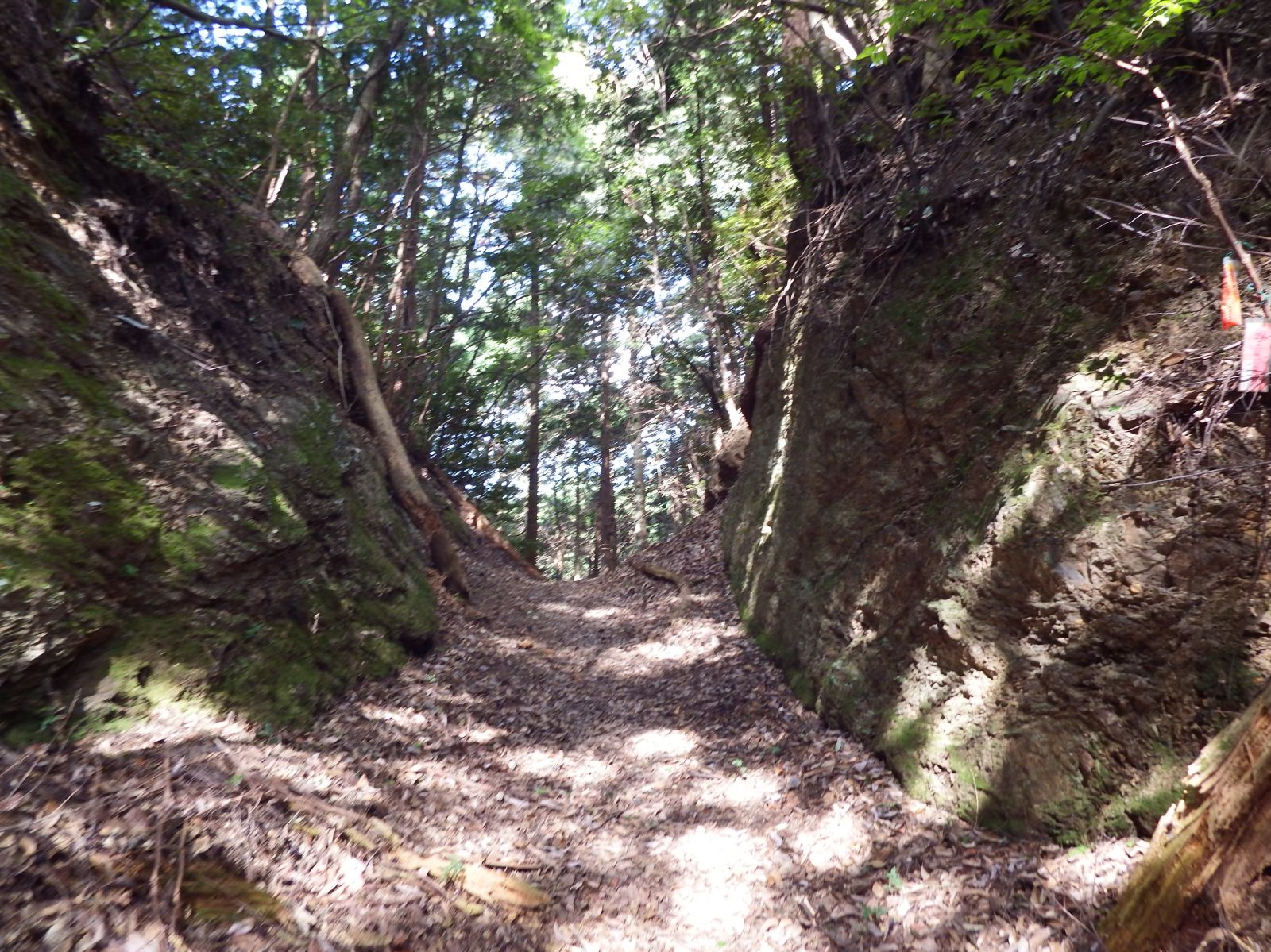 明石寺からの大宝寺道